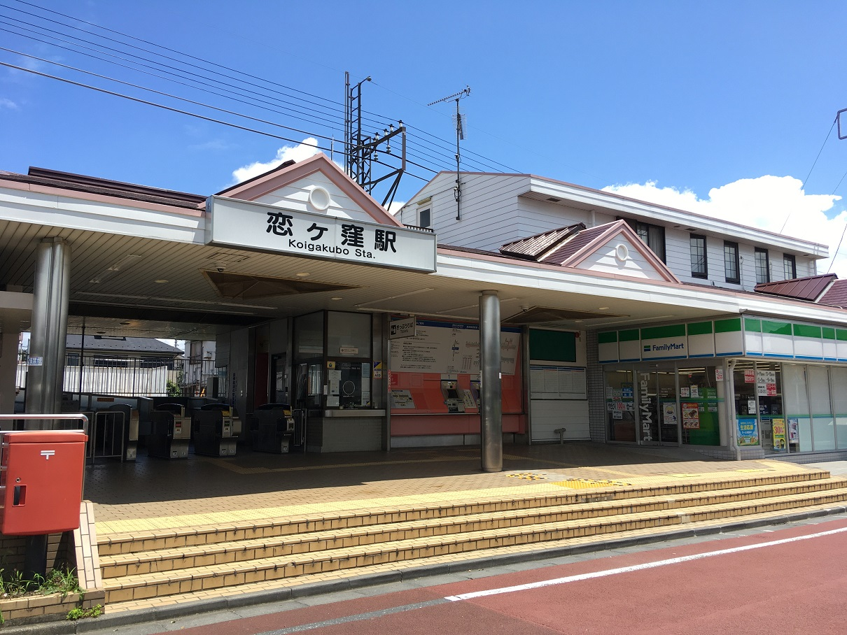 恋ヶ窪駅舎